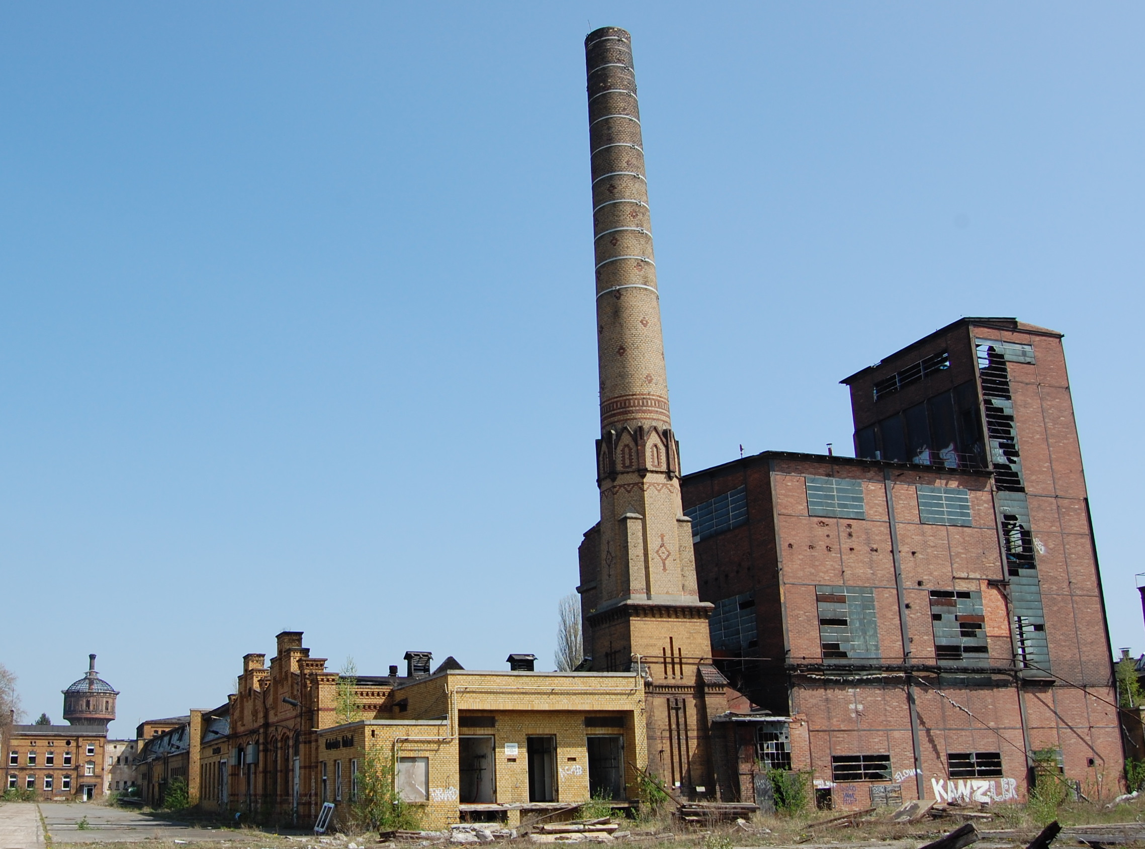 RAW Salbke, ehemalige Kessel- und Maschinenanlage